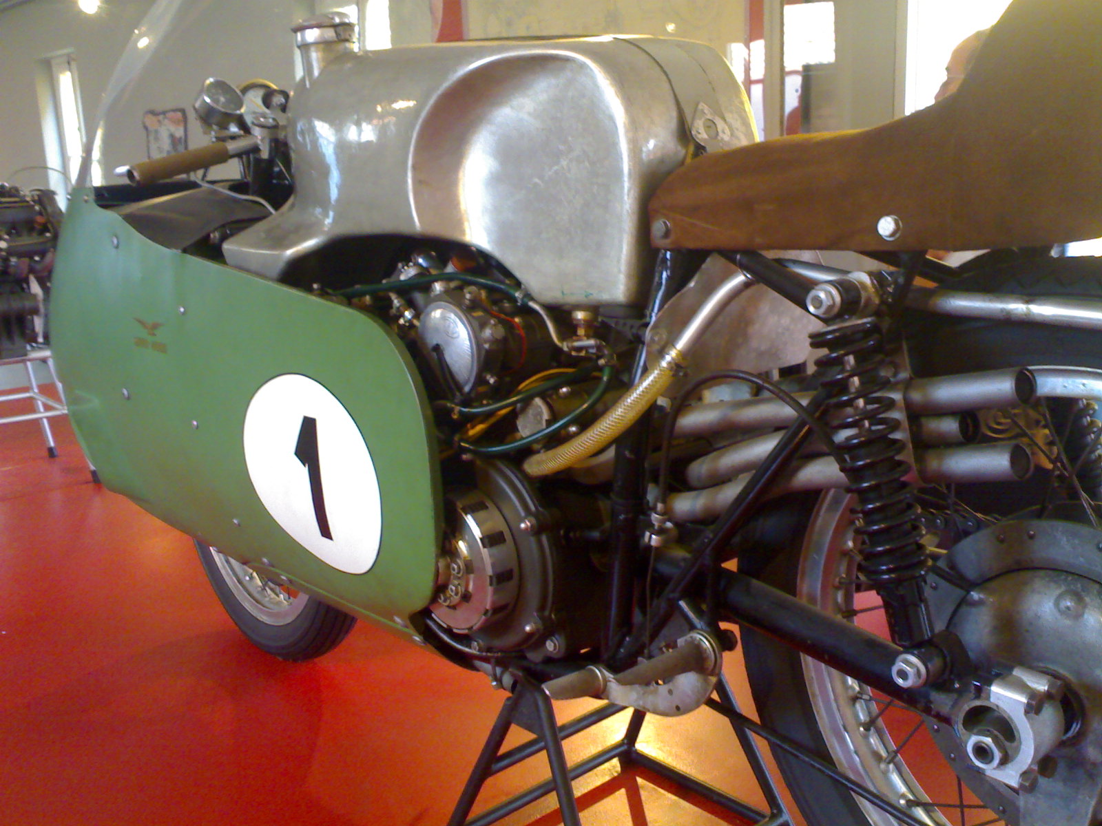 Questa immagine l' ho scattata io stesso (utente bocemandello) al motoraduno guzzi GMG del 2006